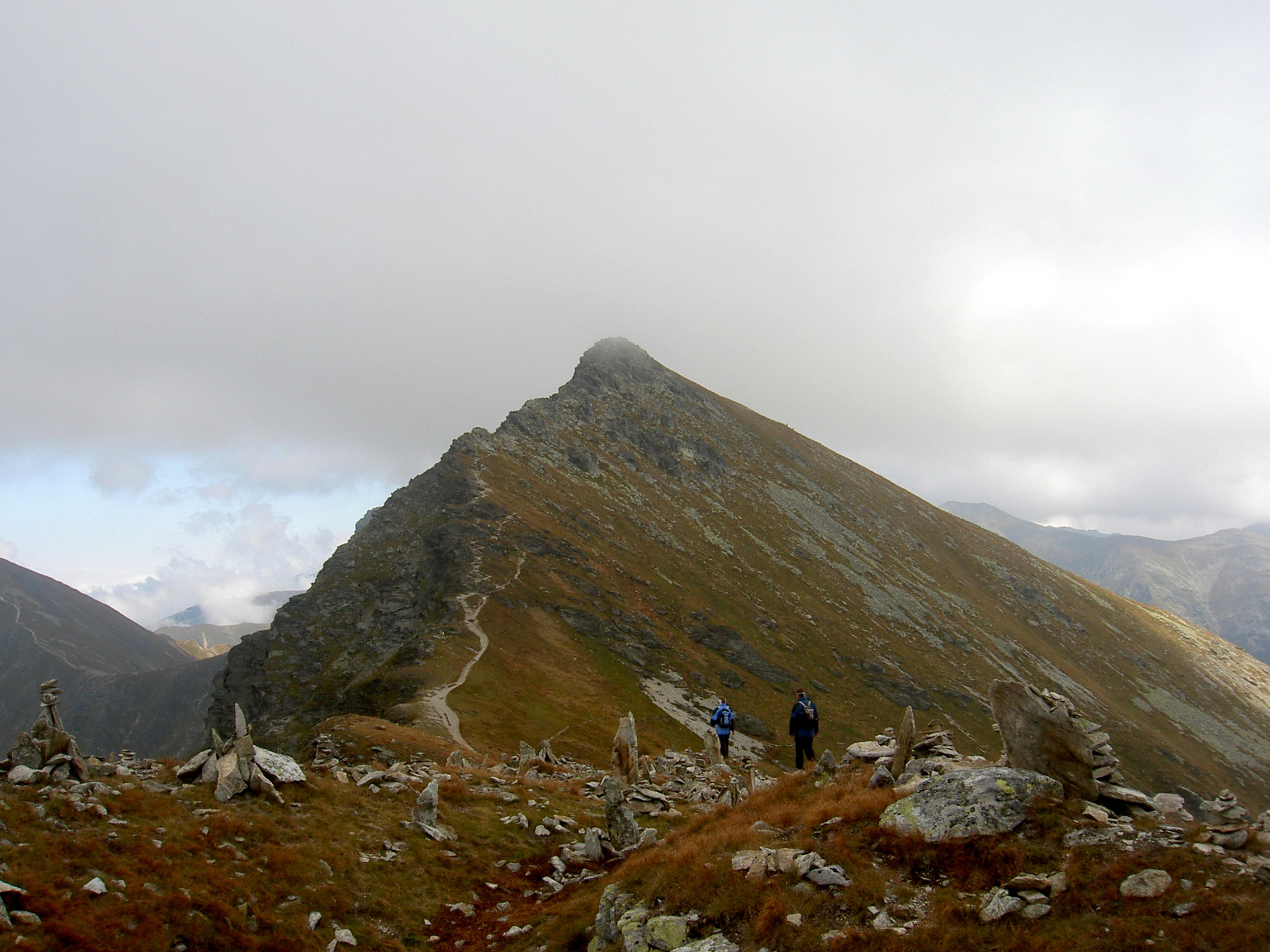 Plačlivé, foceno z cesty vedoucí od Smutného sedla